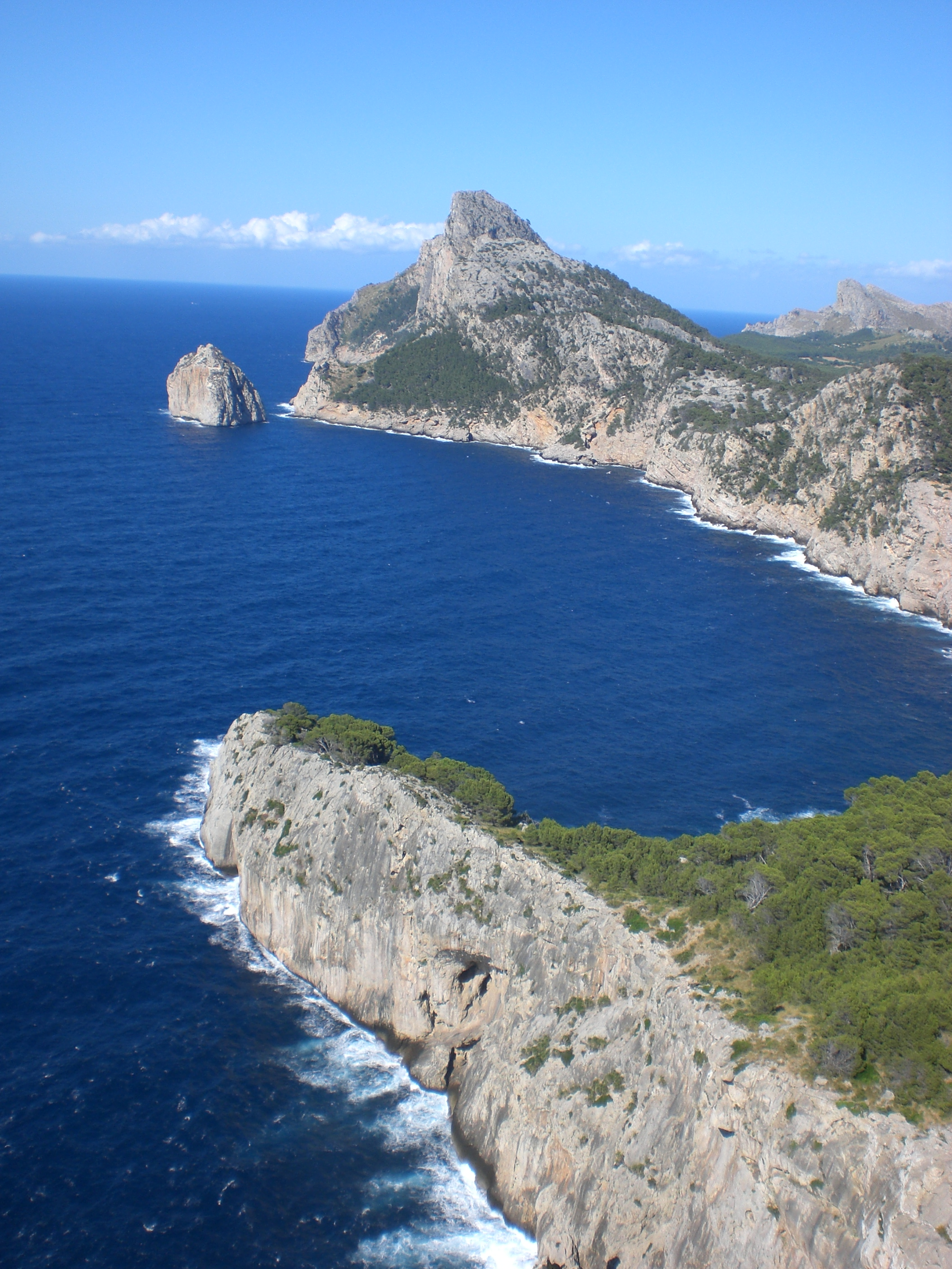 Brisckerly Opera propria Maiorca - Capo Formentor